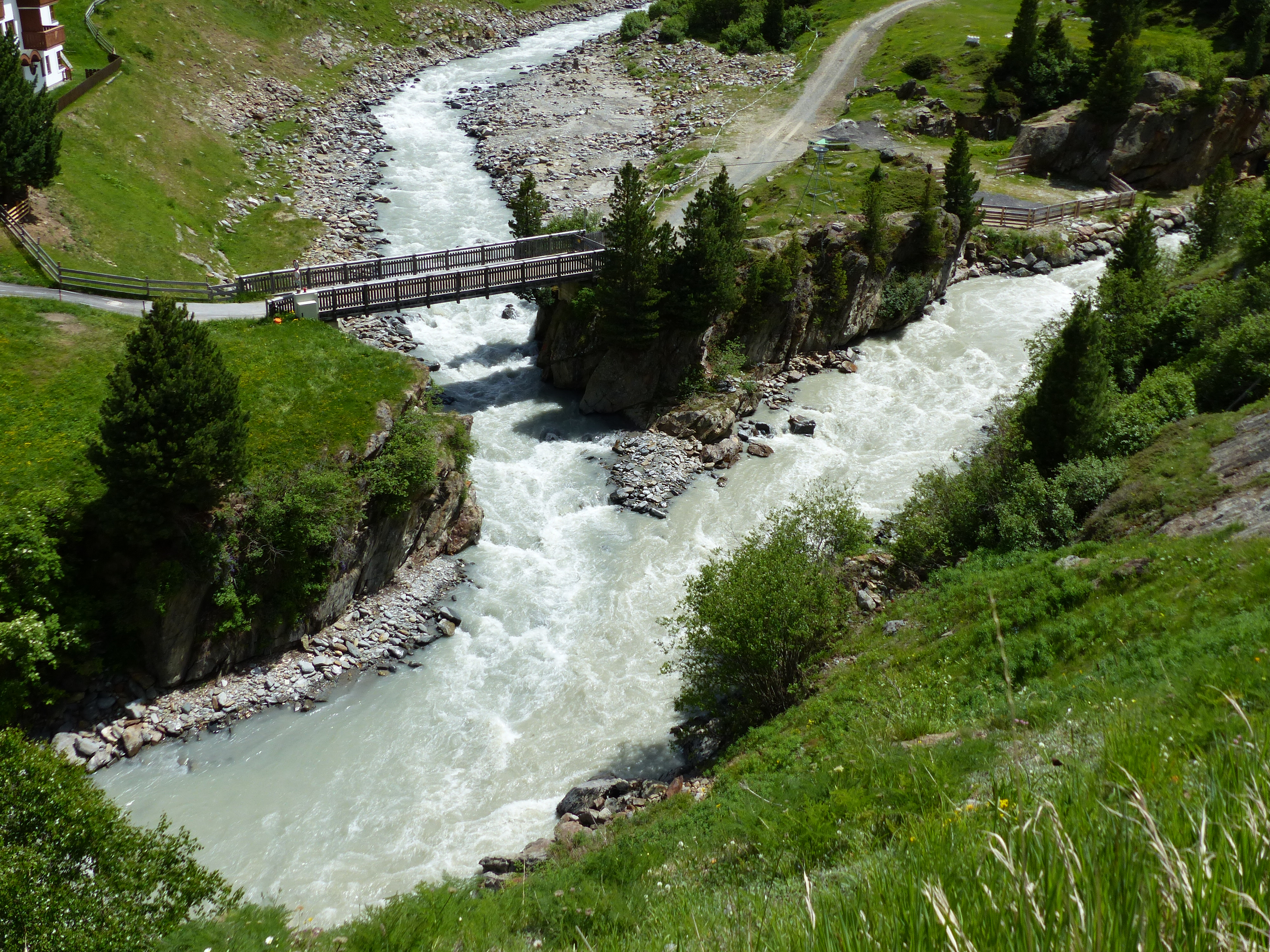 Zusammenfluss von Niedertalbach (oben) und Rofenache (rechts) in Vent: Ursprung der Venter Ache